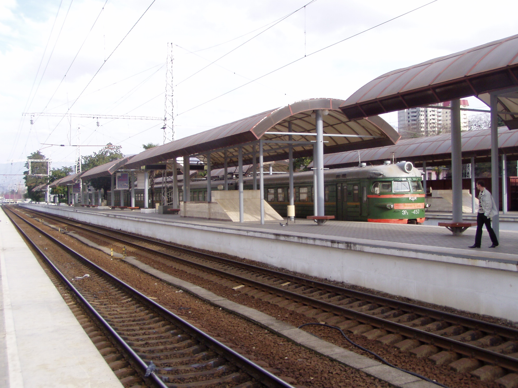 Пригородный электропоезд на платформе станции «Сочи»